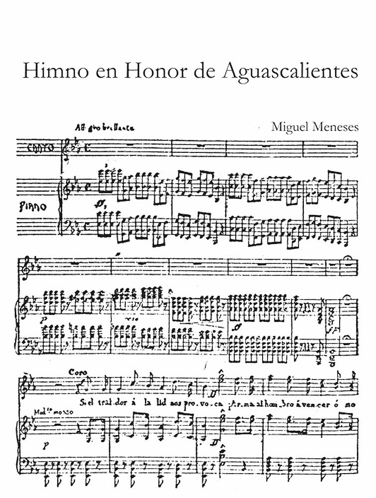 Primera Pagina Original del Himno a Aguascalientes